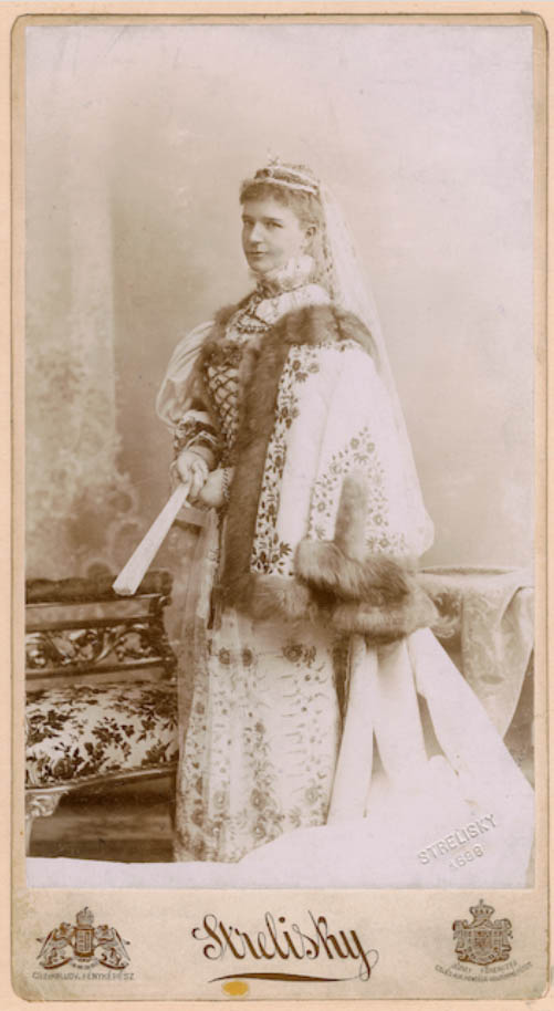 Sztáray Irma grófnő díszmagyarban, egészalakos álló